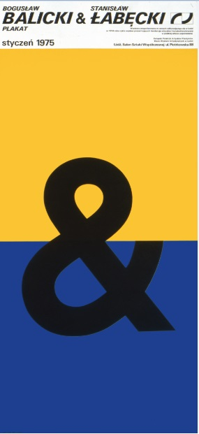 plakat Balicki & Łabęcki, 1975 (Salon Sztuki Współczesnej przy ul. Piotrkowskiej 88)